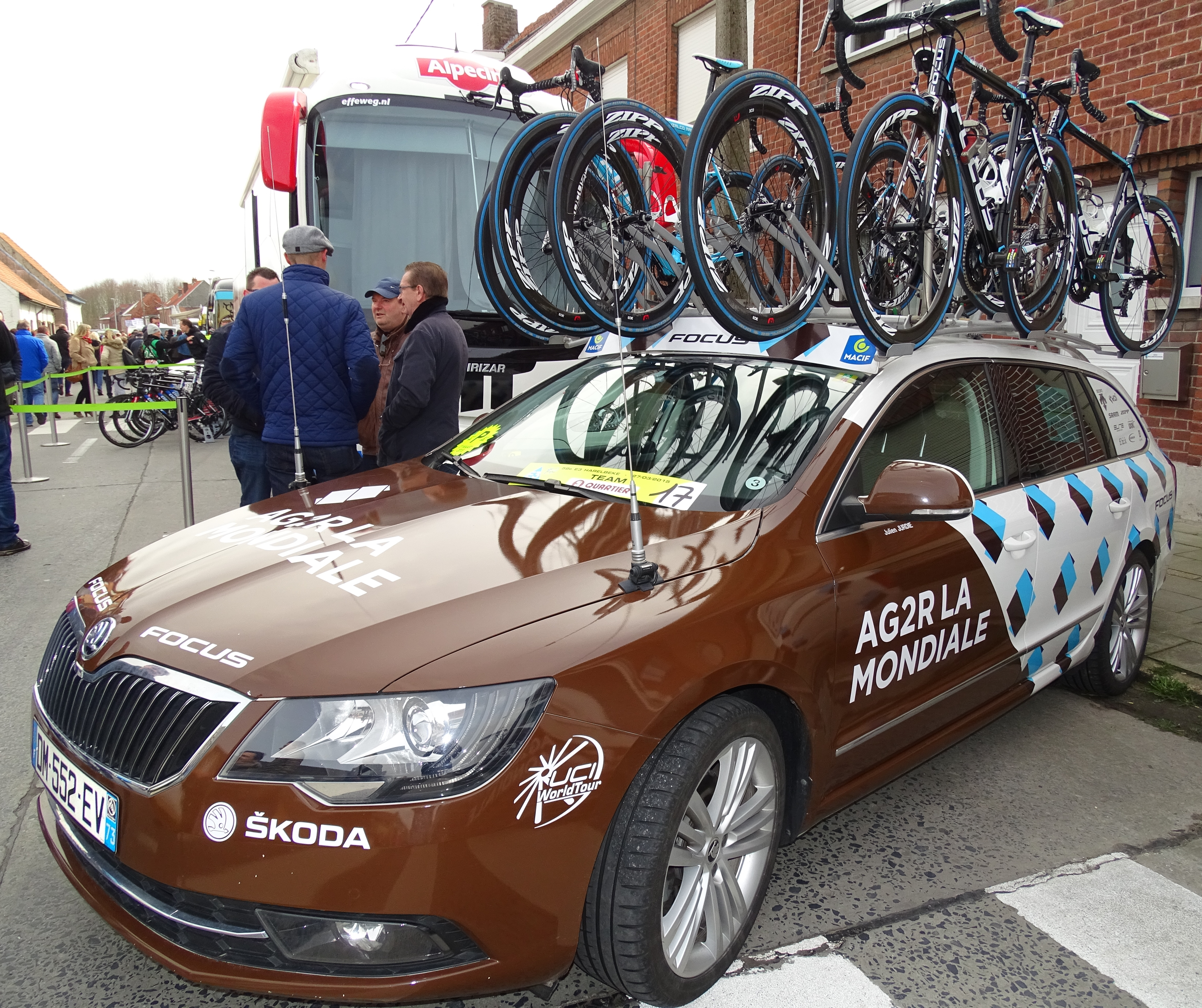 Reportage réalisé le vendredi 27 mars à l'occasion du départ et de l'arrivée du Grand Prix E3 2015 à Harelbeke, Belgique.